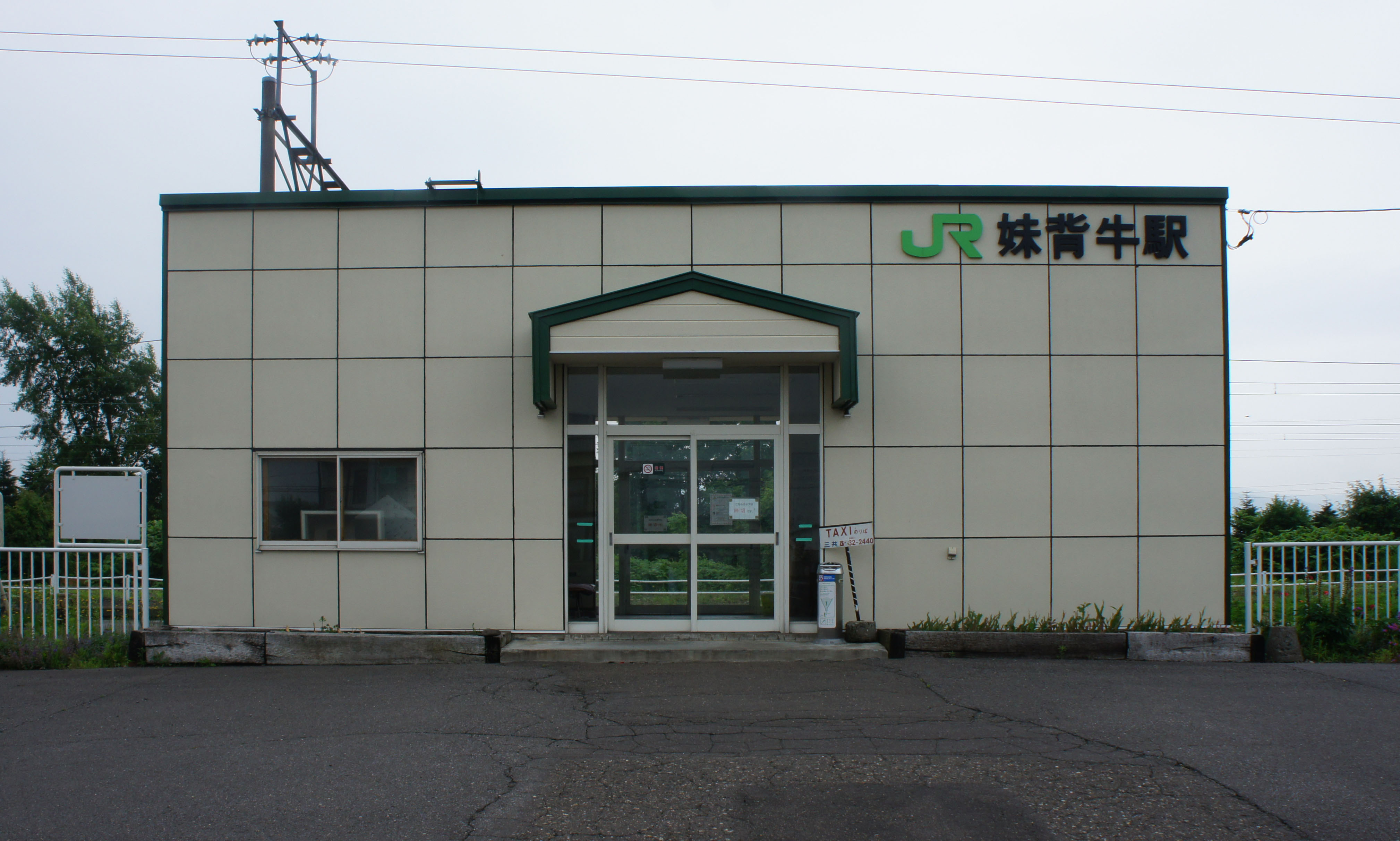 JR函館本線・妹背牛駅の駅舎 Sony NEX-3